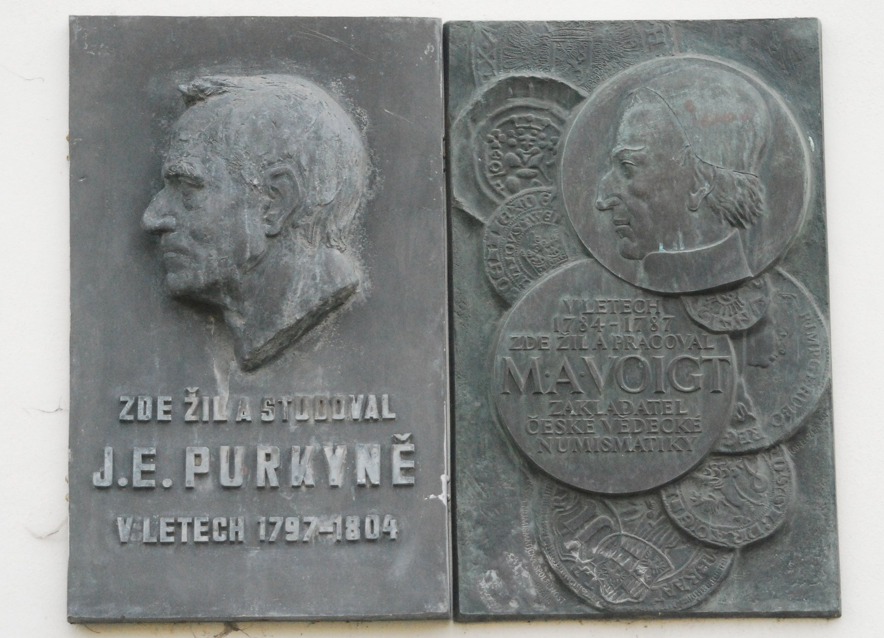 Gedenktafeln für J. E. Purkyne und Mavoigt in Mikulov